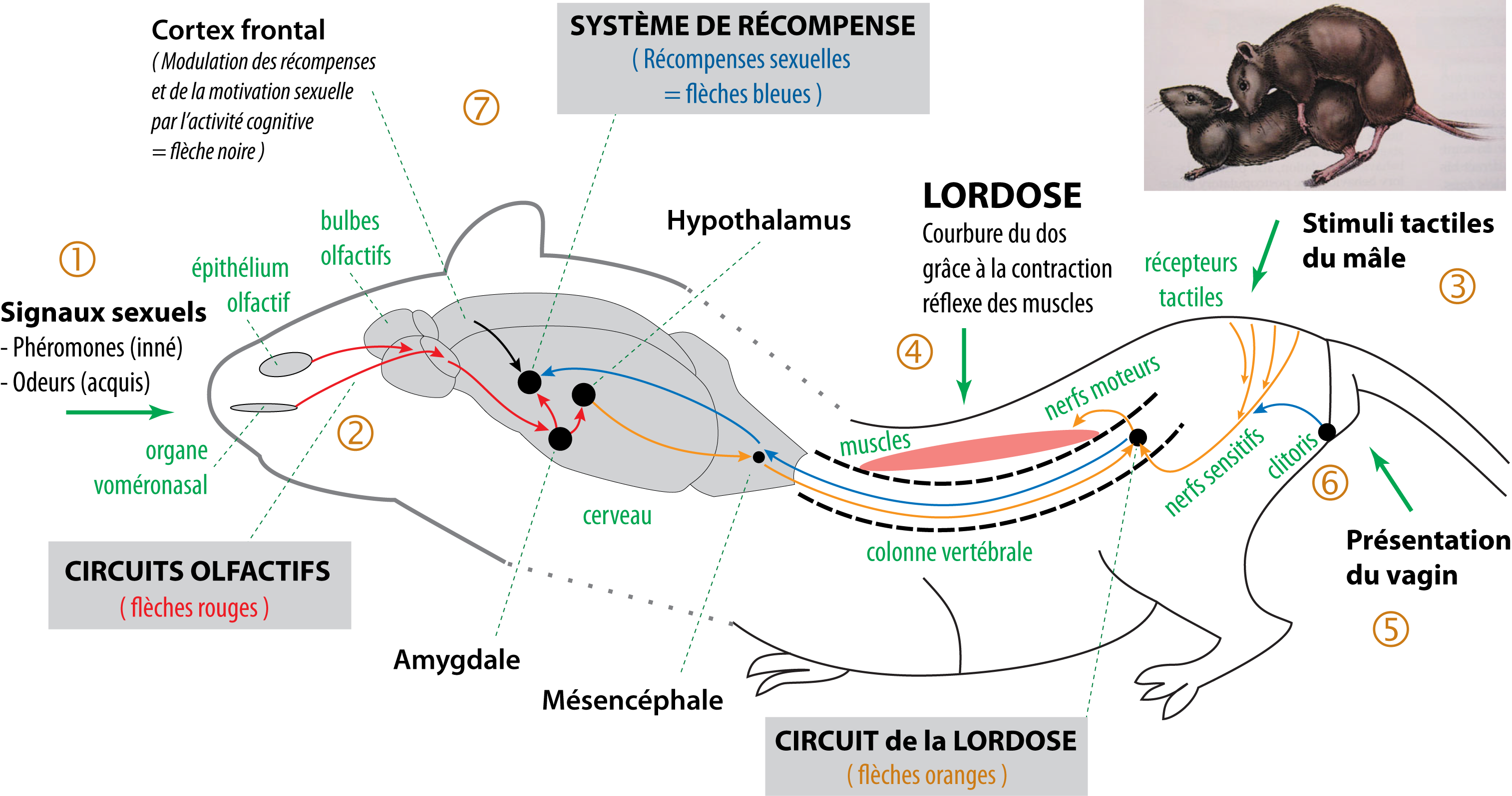 Schéma simplifié des circuits neurobiologiques de l'instinct sexuel des mammifères, chez la femelle. Le comportement sexuel des mammifères est contrôlé, en simplifiant, par trois grands circuits neurobiologiques : les circuits olfactifs (flèches rouges), les circuits des réflexes sexuels (lordose, érection, éjaculation… flèches oranges), et les circuits des récompenses sexuelles (système de récompense associé au pénis/clitoris – flèches bleues). Les hormones contrôlent le développement, puis l'activité de ces circuits. Voir le résumé ci-dessous pour les explications et les références. Schéma adapté d'après : Wunsch S. Comprendre les origines de la sexualité humaine. Neurosciences, éthologie, anthropologie. L'Esprit du Temps, 2014